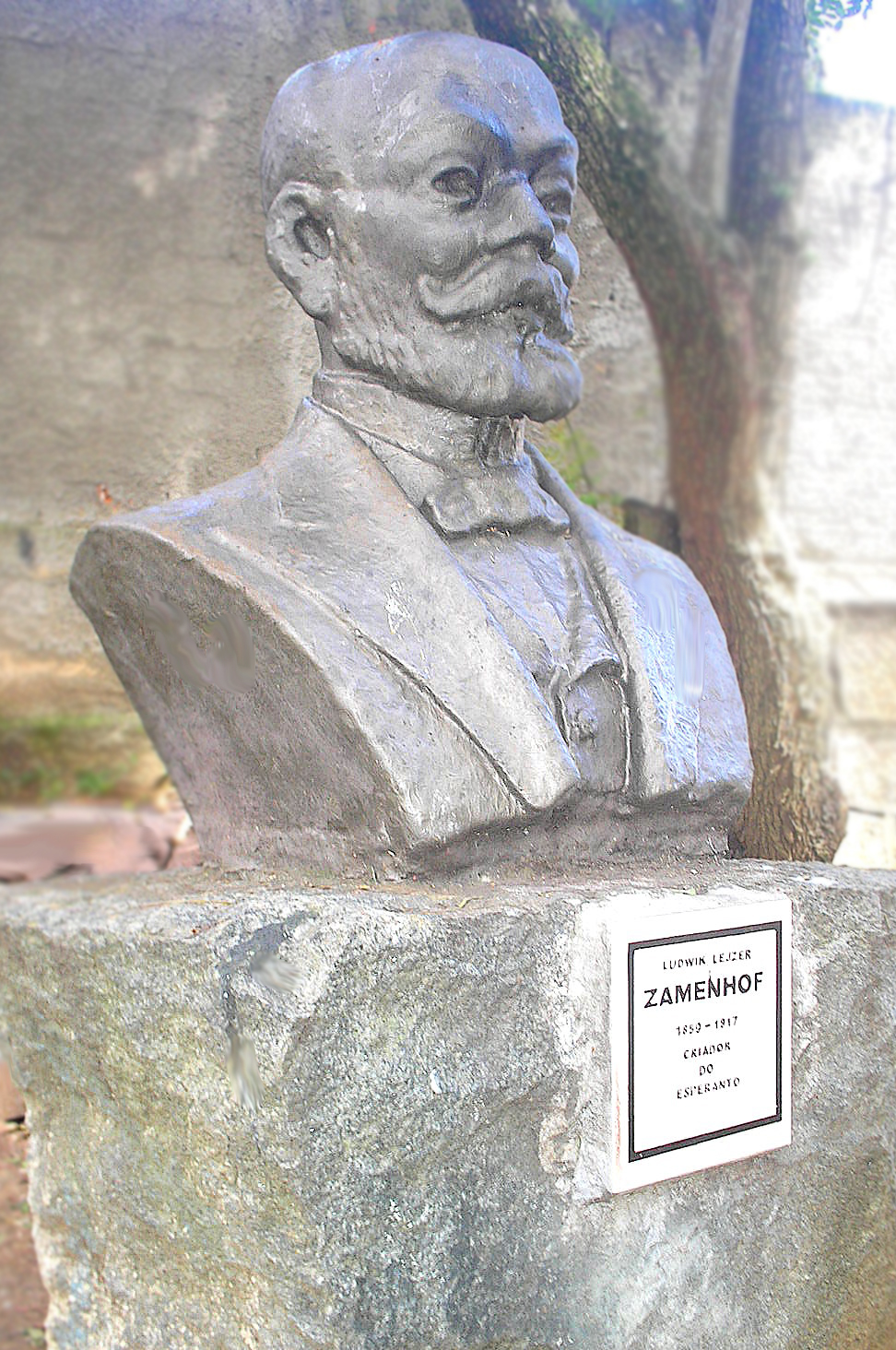 Monumento a Zamenhof (criador do Esperanto), inaugurado em 1972, na cidade brasileira de Curitiba-PR. Está situado ao lado da Igreja Nossa Senhora do Perpétuo Socorro, próxima à Rua Zamenhof. Na placa está escrito: Ludwik Lejzer Zamenhof 1859 - 1917 Criador do Esperanto